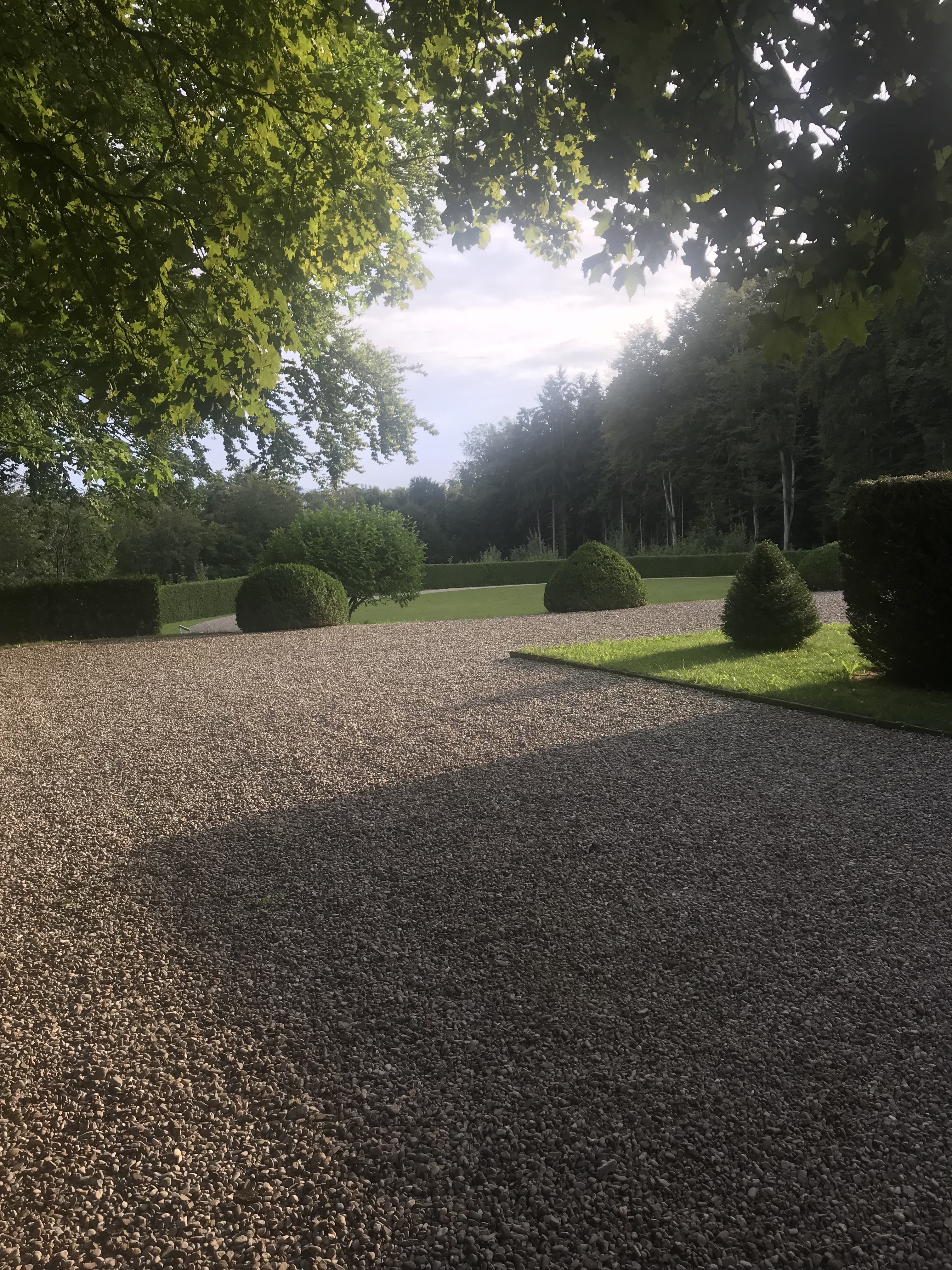 Jardin du Bois-Murat vue coté Est